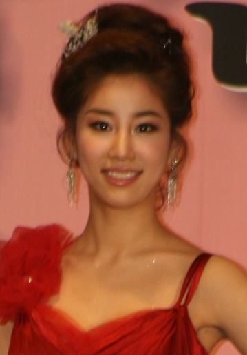 2009 미스코리아 서울 진 김주리 드레스 심사